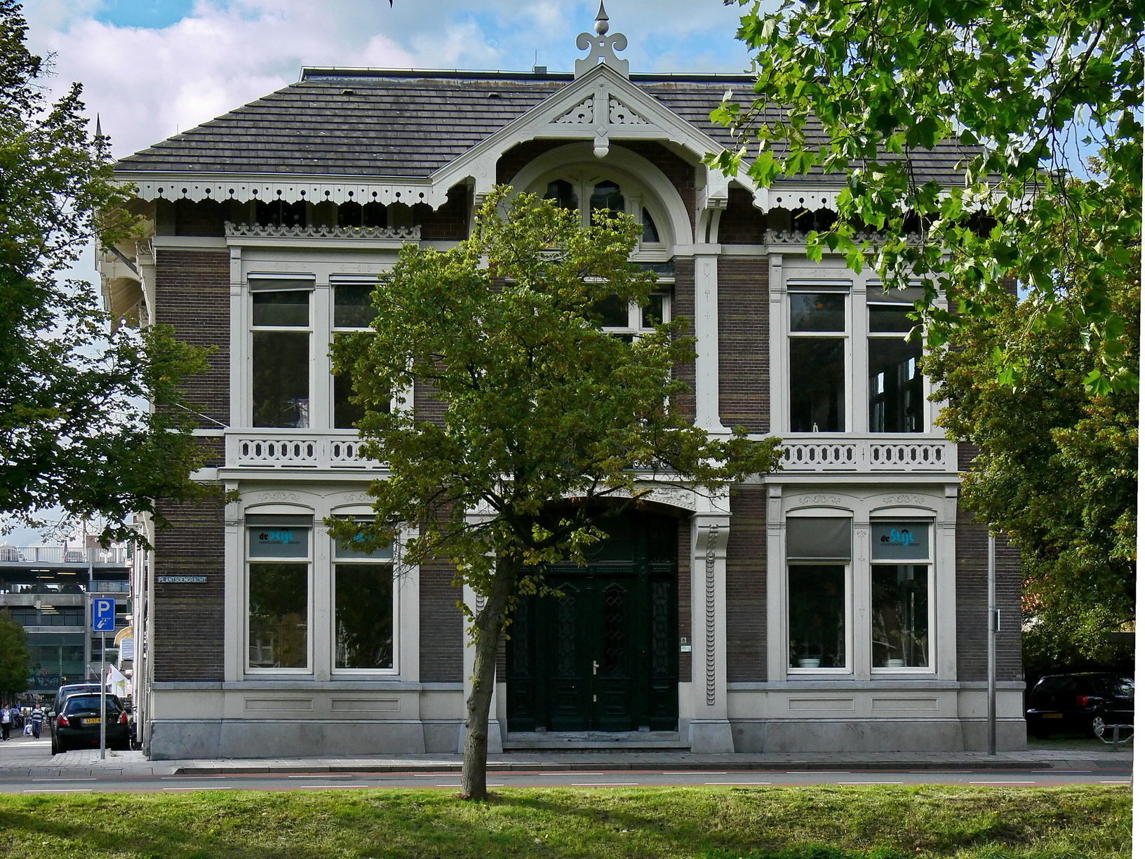 Villa 'Clementine', gebouwd in 1880 in eclectische trant door de plaatselijk bekende architect J.V. Lankelma. De villa was bestemd voor de houthandelaar Nicolaas S.A. Brandjes en werd vernoemd naar diens echtegenote Clementine van Rijn. Na bewoning kreeg het pand als gemeentelijk eigendom kantoorbestemmingen, waaronder die als tijdelijk raadhuis (1910), kantongerecht (1913) en kantoor voor de ontvanger der Registratie en Domeinen, en t.b.v. het Ministerie van Landbouw, die er tot op heden huurder is. De villa lag ten tijde van de bouw aan de stadsrand.